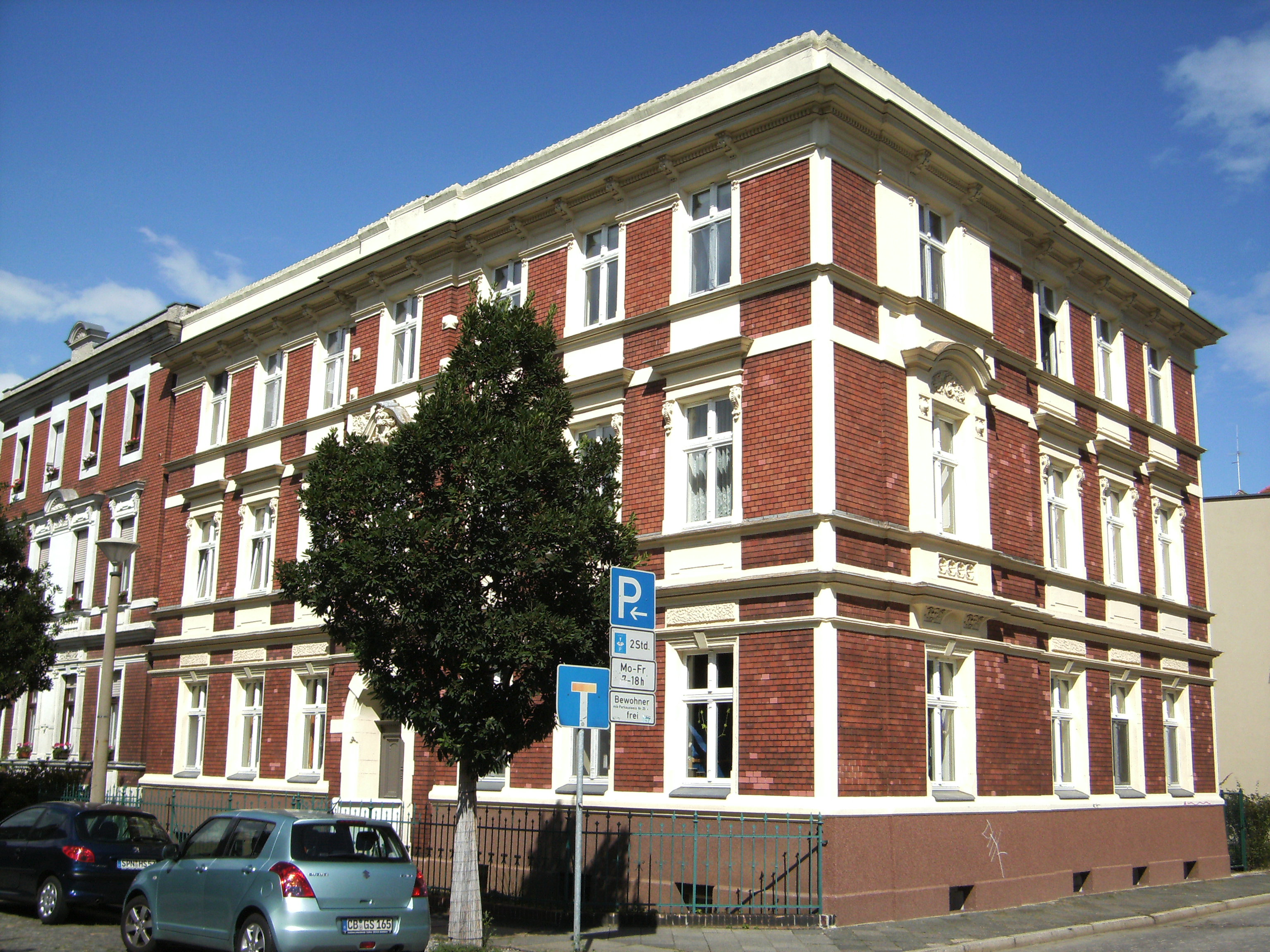 Wernerstr. 22